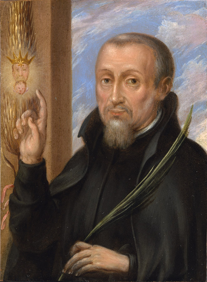 Fr Henry Garnet.